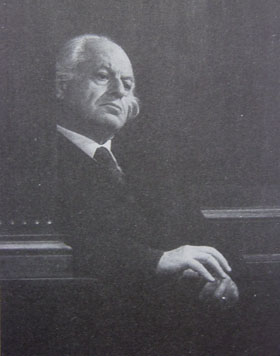 Fotografia del filosofo italiano Giuseppe Semerari.